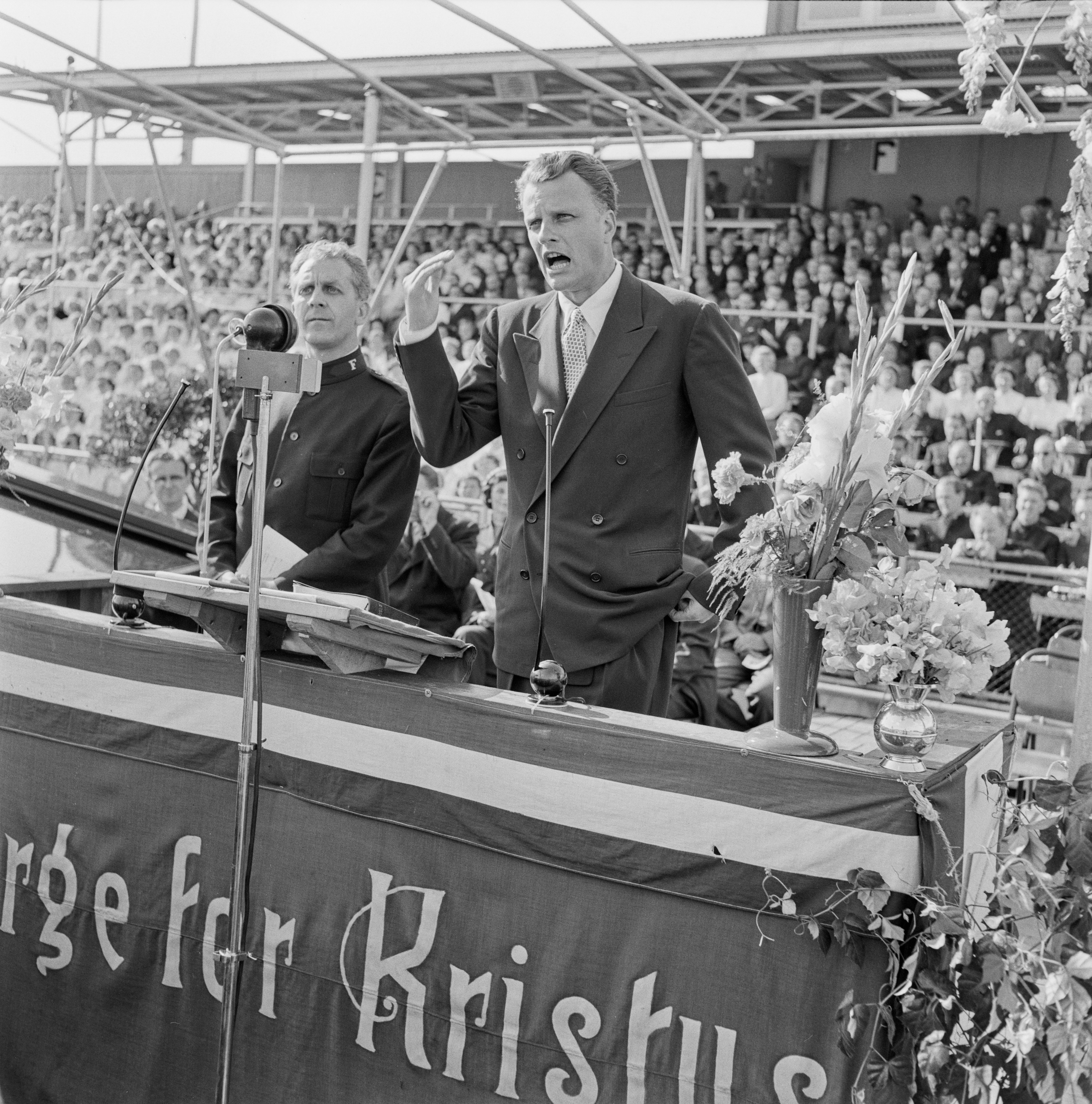 Bildet er hentet fra Arkivverket. Billy Graham Arkivinstitusjon : Riksarkivet Arkivnavn : Billedbladet NÅ Sted : Norge, Oslo, Oslo, Ullevål stadion Emneord: kristendom, forkynnelse, møter Avbildet: Graham, Billy